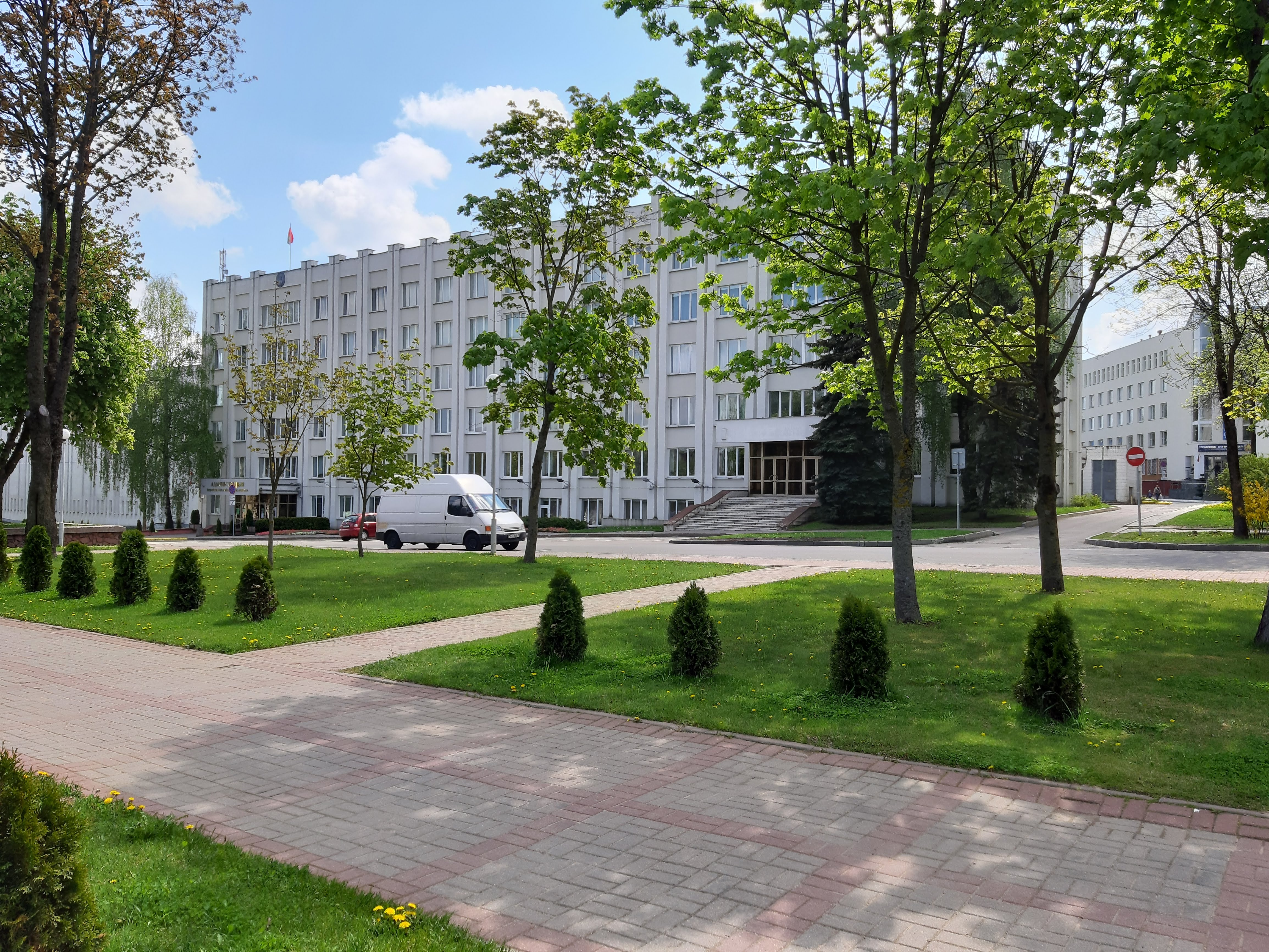 Мінск. Кальварыйскі сквер у 2019